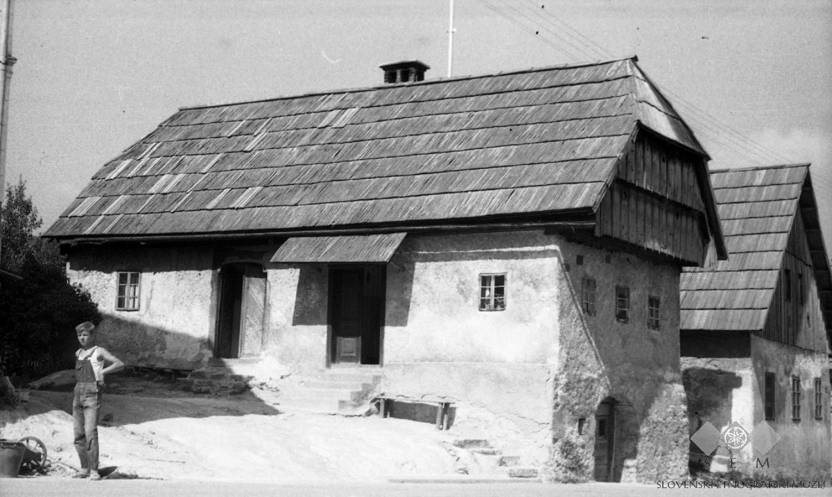 Hiša, krita s "šindrami" v Prezidu.